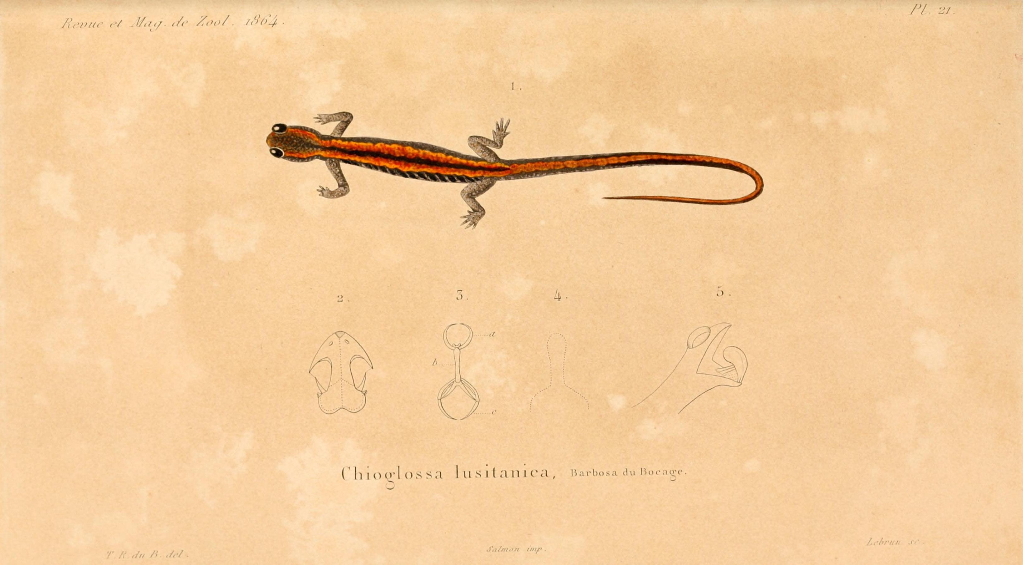 Aguarela original feita por José Vicente Barbosa du Bocage de um exemplar de Chioglossa lusitanica. Publicada na revista Revue et magasin de zoologie pure et appliquée em 1864.